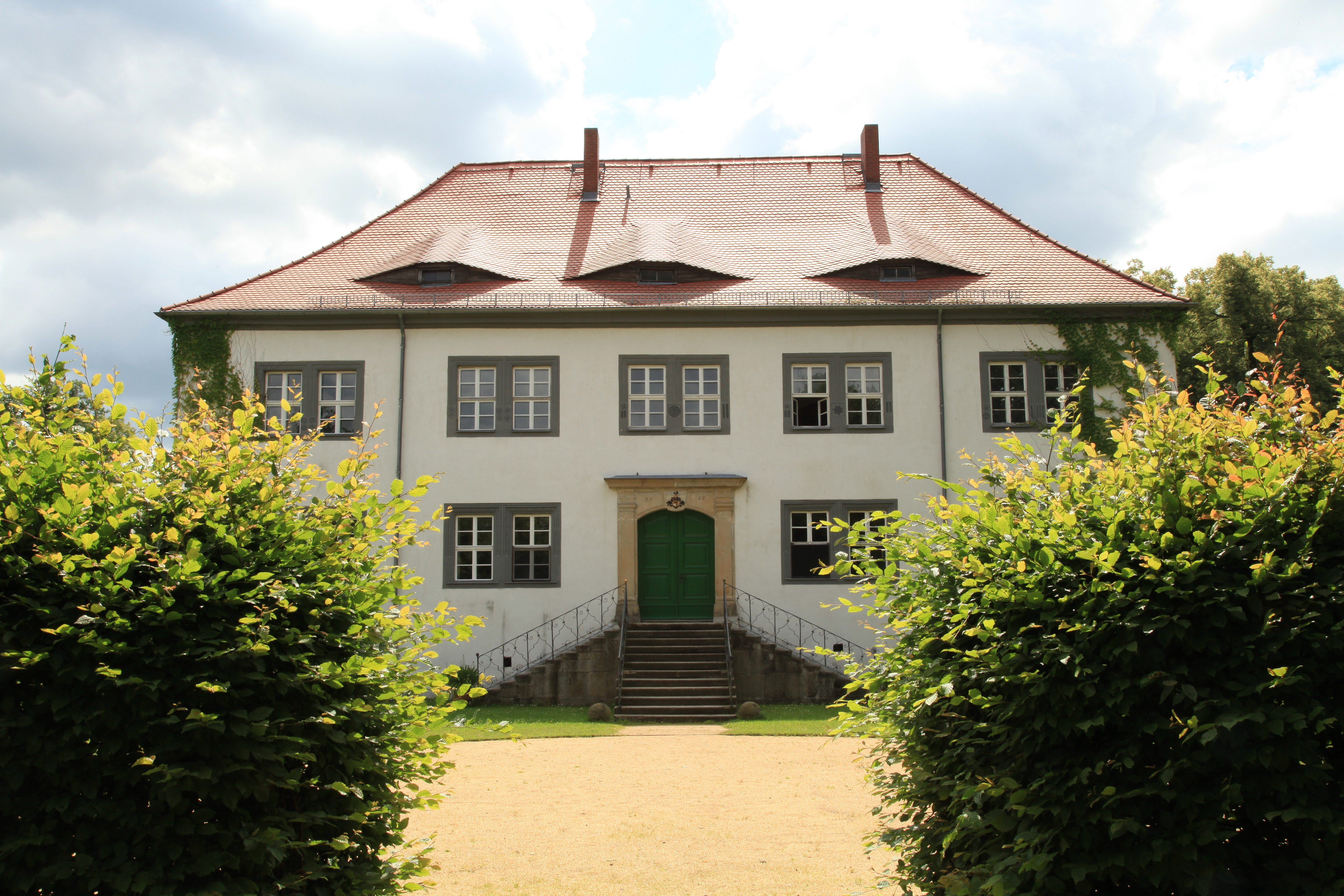 Schloss Spreewiese, Schlossweg 1 in Spreewiese, Großdubrau Hornjoserbsce: Lichański hród